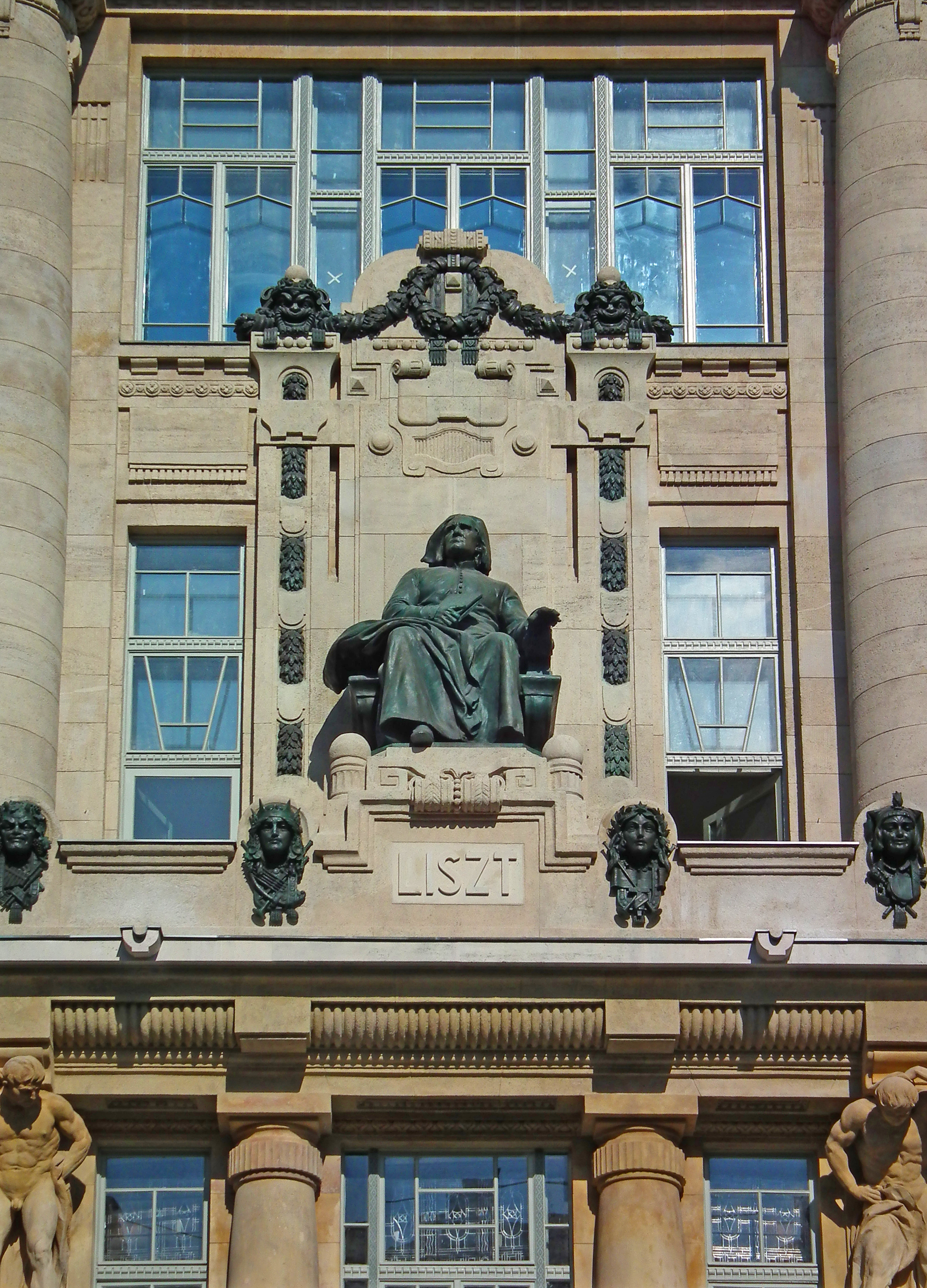 Liszt Ferenc Zeneművészeti Főiskola This is a photo of a monument in Hungary. Identifier: 755